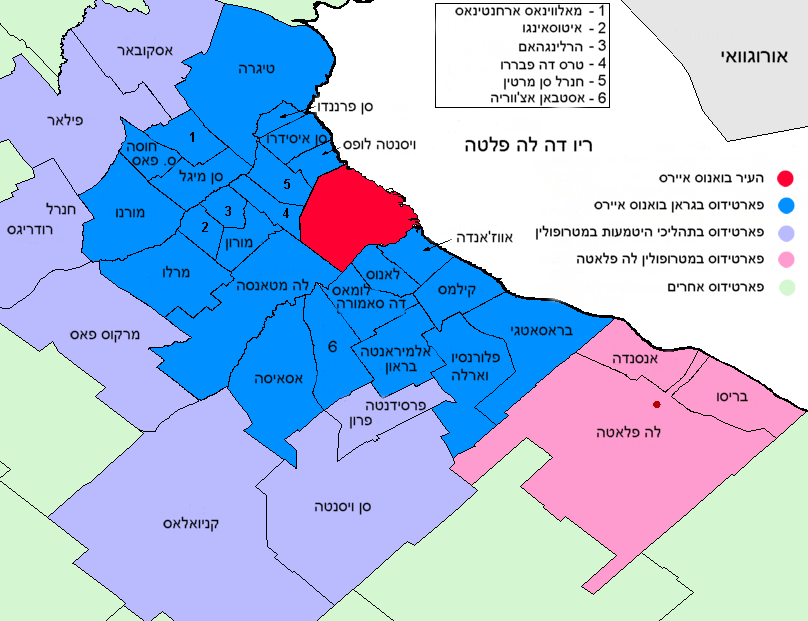 אזור גראן בואנוס איירס